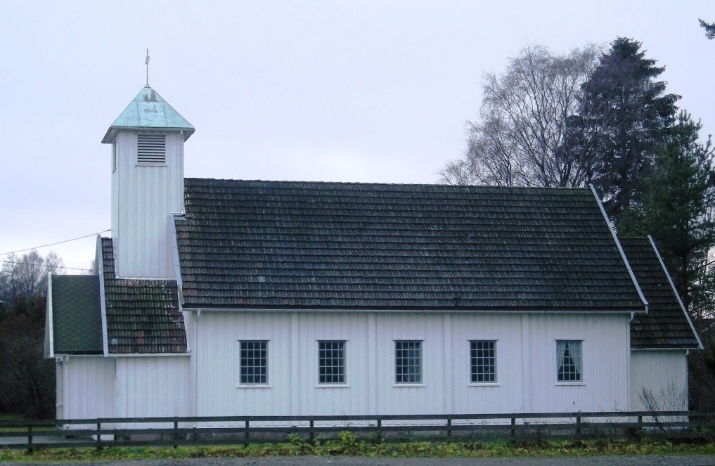 Gullaug kirke, Lier kommune